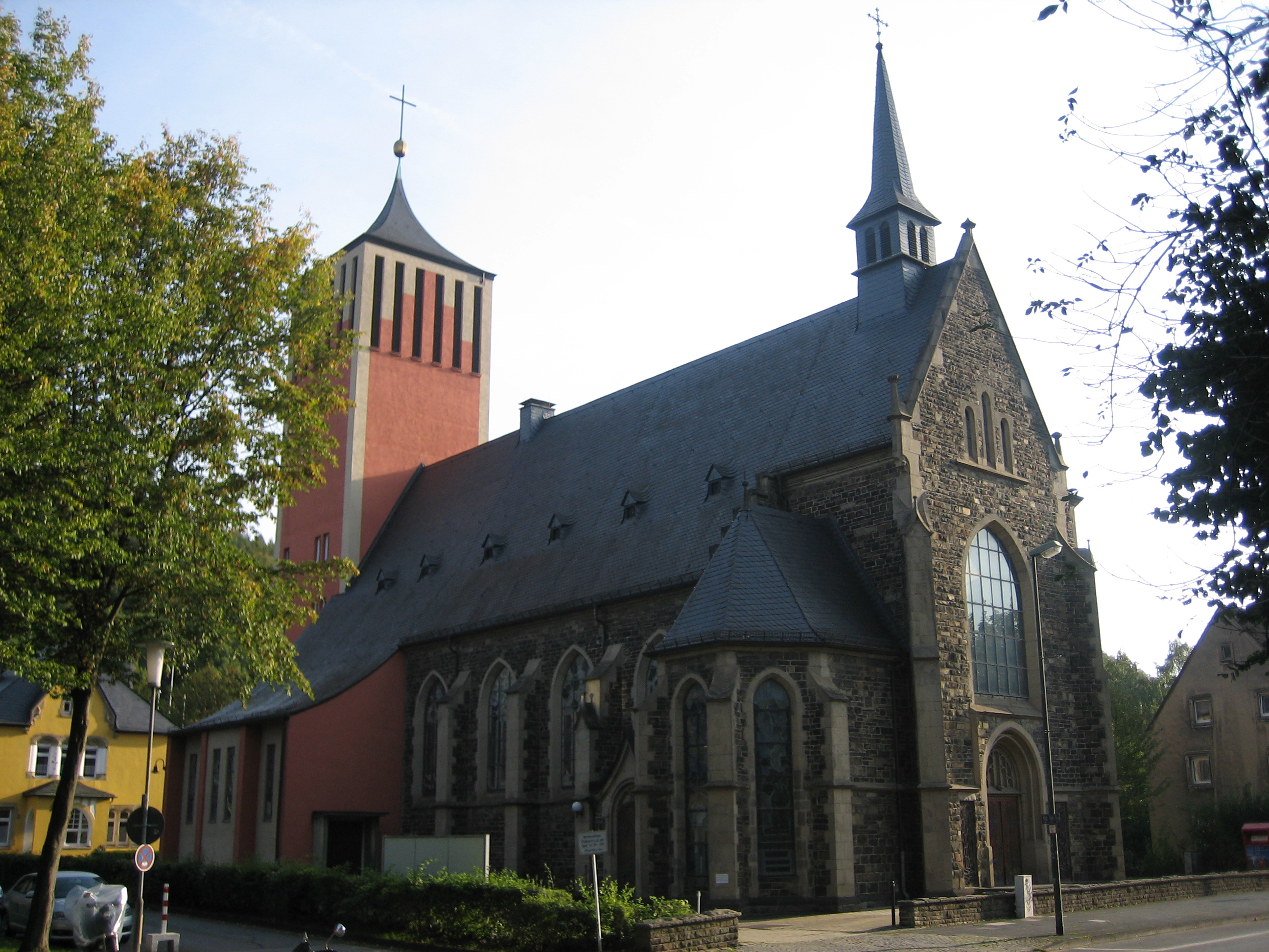 römisch-katholische Herz-Jesu-Kirche in Hagen This is a photograph of an architectural monument.